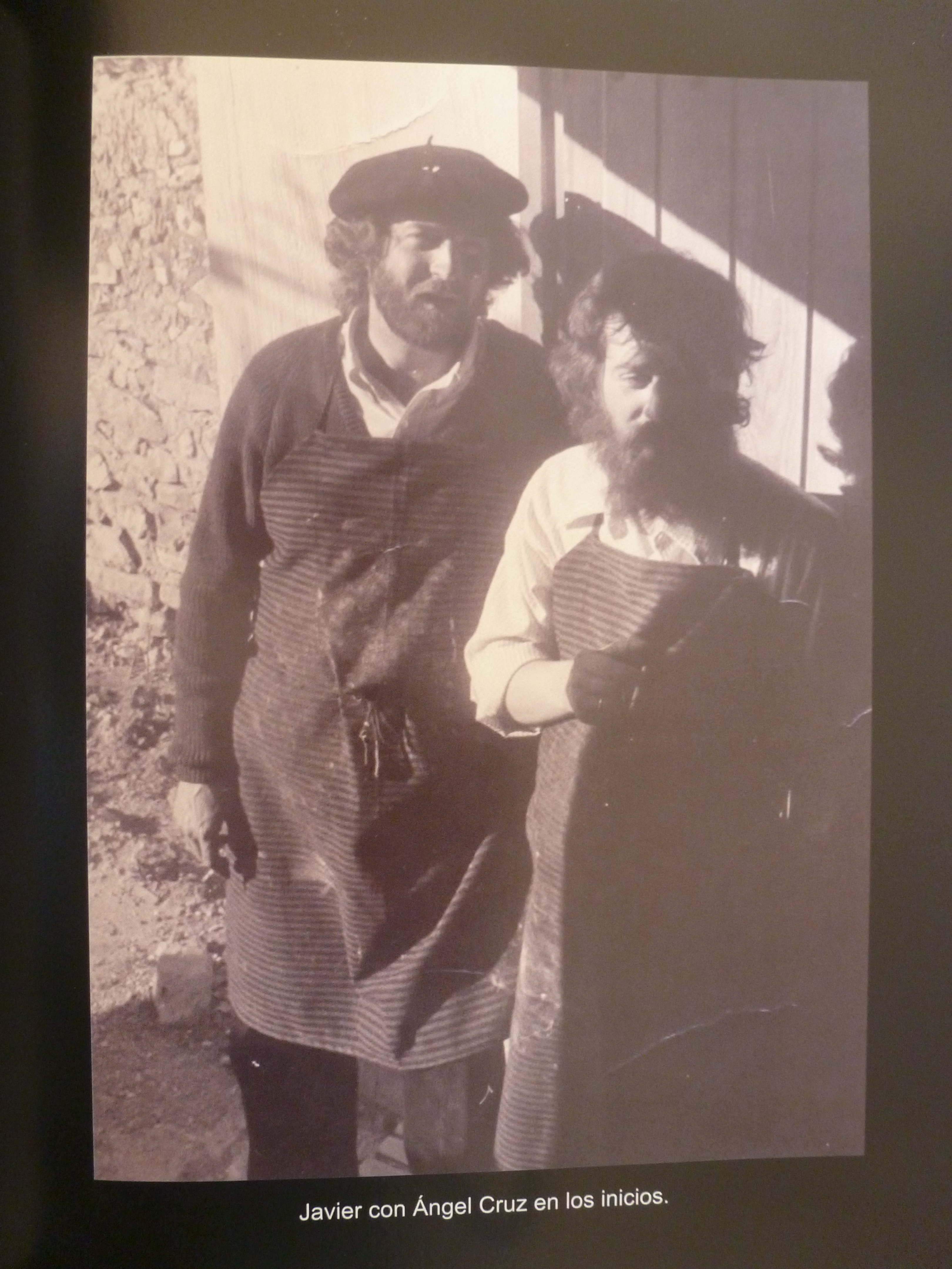 Javier Cebrián y Angel Cruz en su primer taller de serigrafía, donde se estampó obra de los artistas plásticos más representativos de la vanguardia de la transición cultural española.